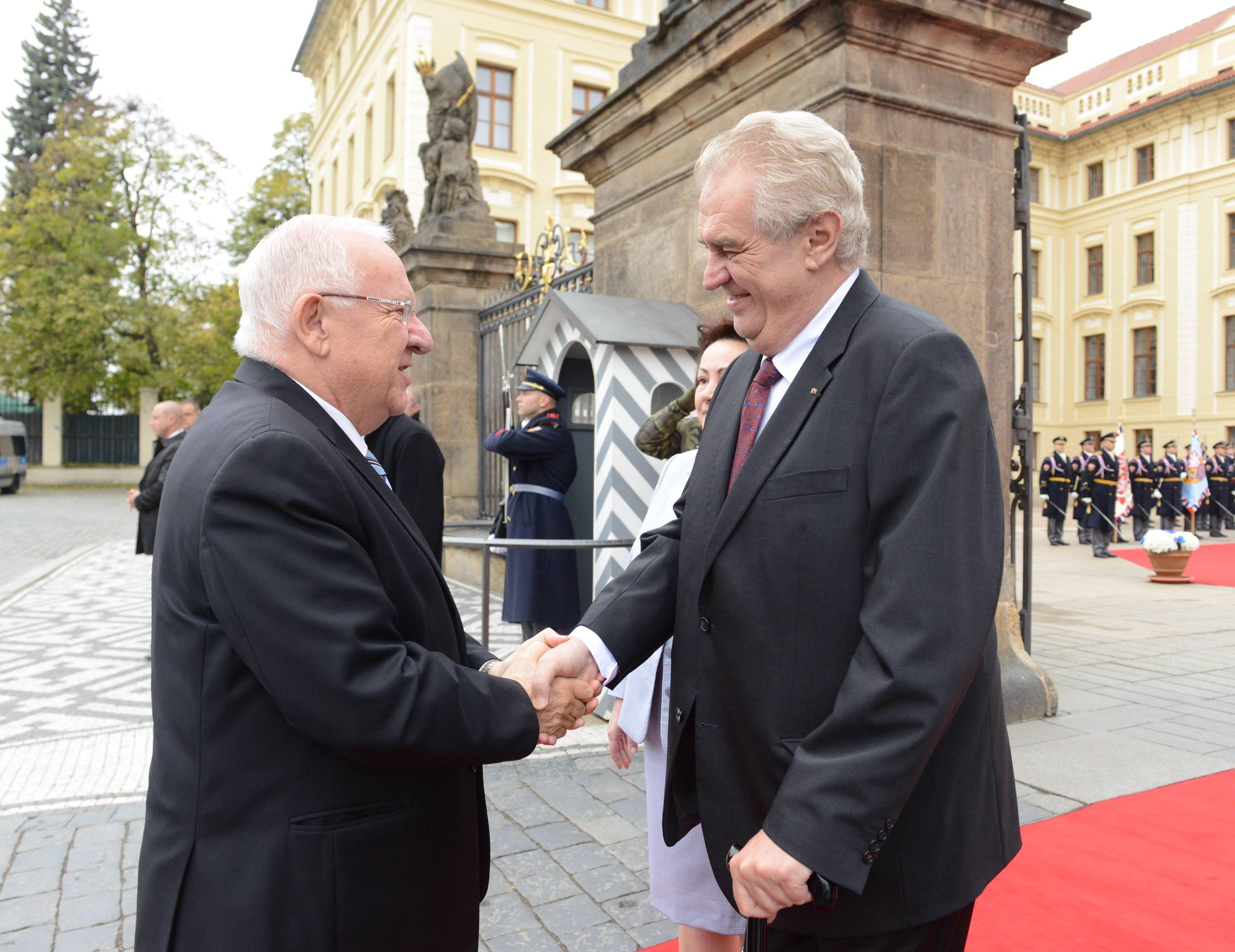 נשיא מדינת ישראל ראובן ריבלין בביקור רשמי בארמון הנשיאות של צ'כיה, מתקבל על ידי נשיא צ'כיה מילוש זמאן